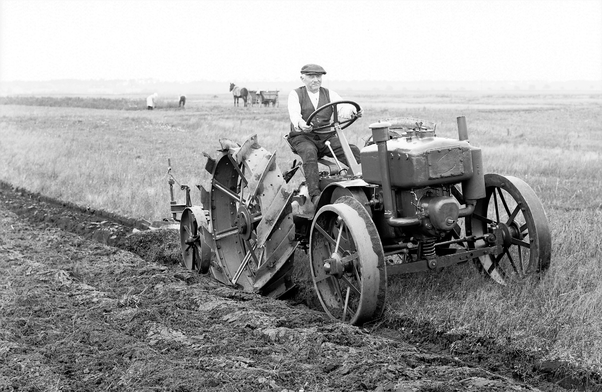 Bildbeschreibung: Mercedes-Benz Ackerschlepper OE Quelle: DaimlerChrysler AG Genehmigung: "Gern können Sie für Ihre Tätigkeit für die Wikipedia Inhalte der DaimlerChrysler Medienseiten verwenden. Dazu erkennen wir die Bedingungen nach GNU-FDL an. Das Angebot bezieht sich auch auf die vorhandenen Bilder." (Dr.Josef Ernst, Communications, DaimlerChrysler AG)